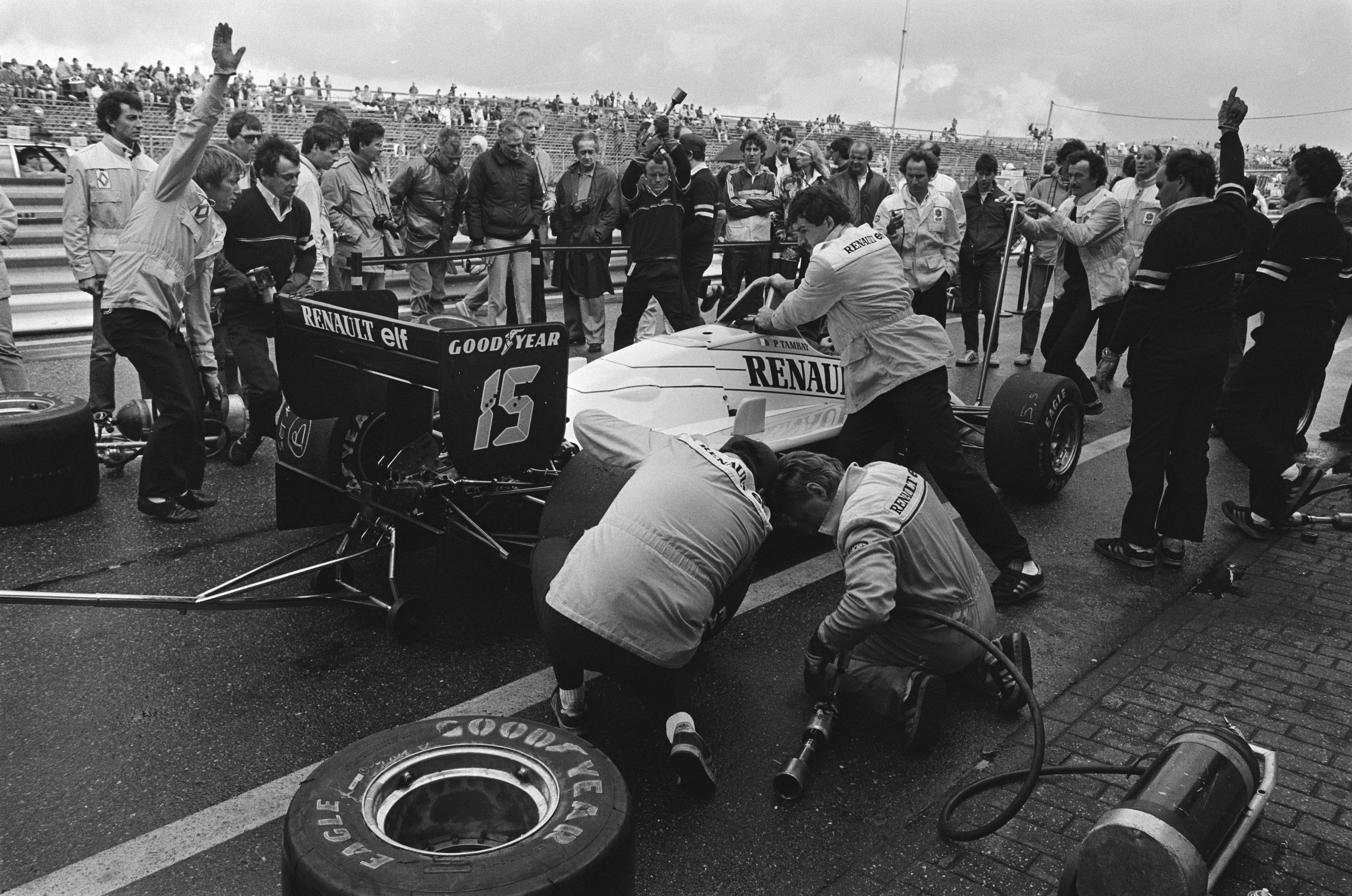 Grote Prijs van Nederland Formule I op Zandvoort; auto's in de pits.